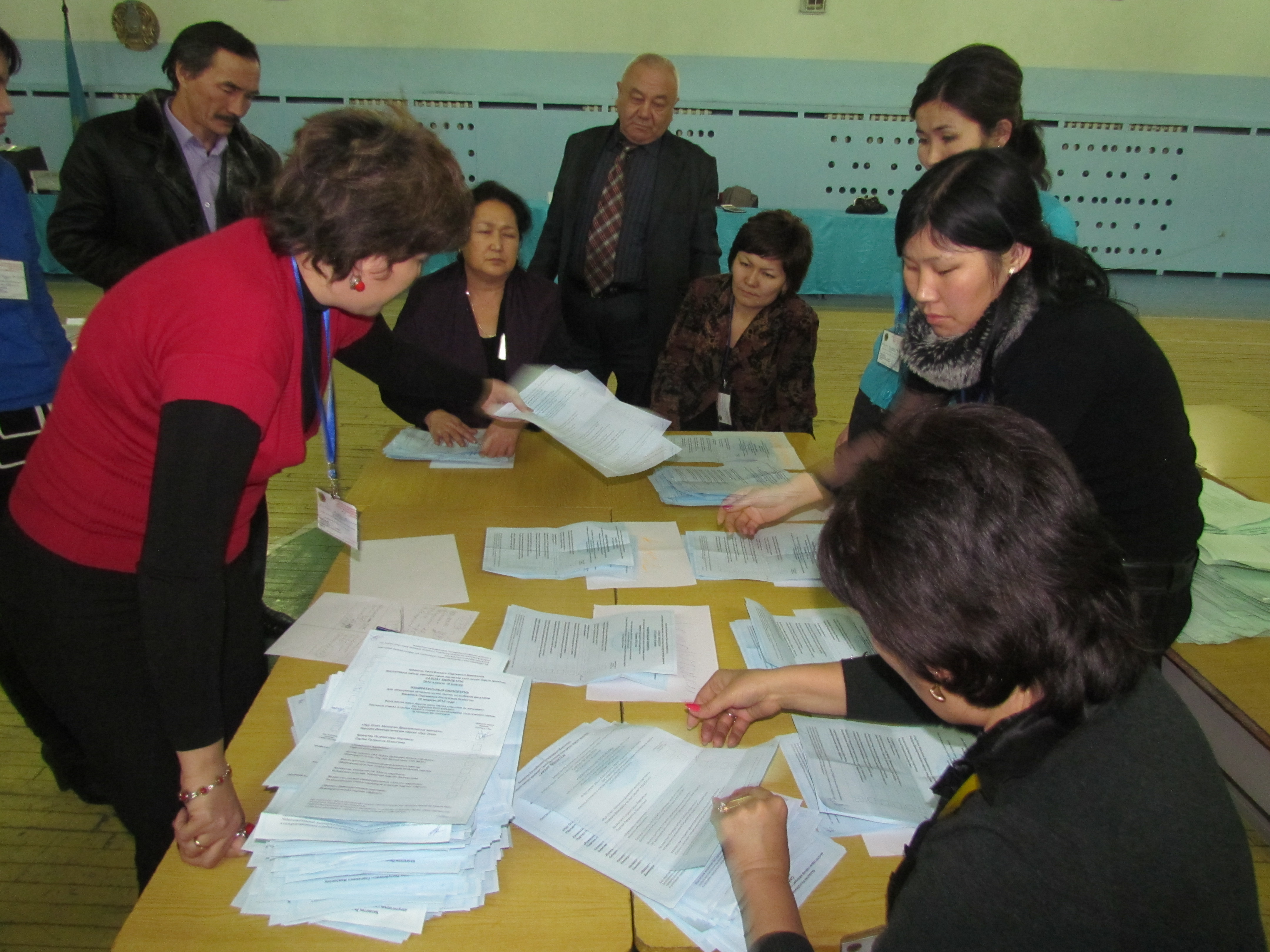 Подсчёт голосов на внеочередных выборах депутатов мажилиса парламента Республики Казахстан на избирательном участке № 432 в Алматы. 15 января 2012 года.